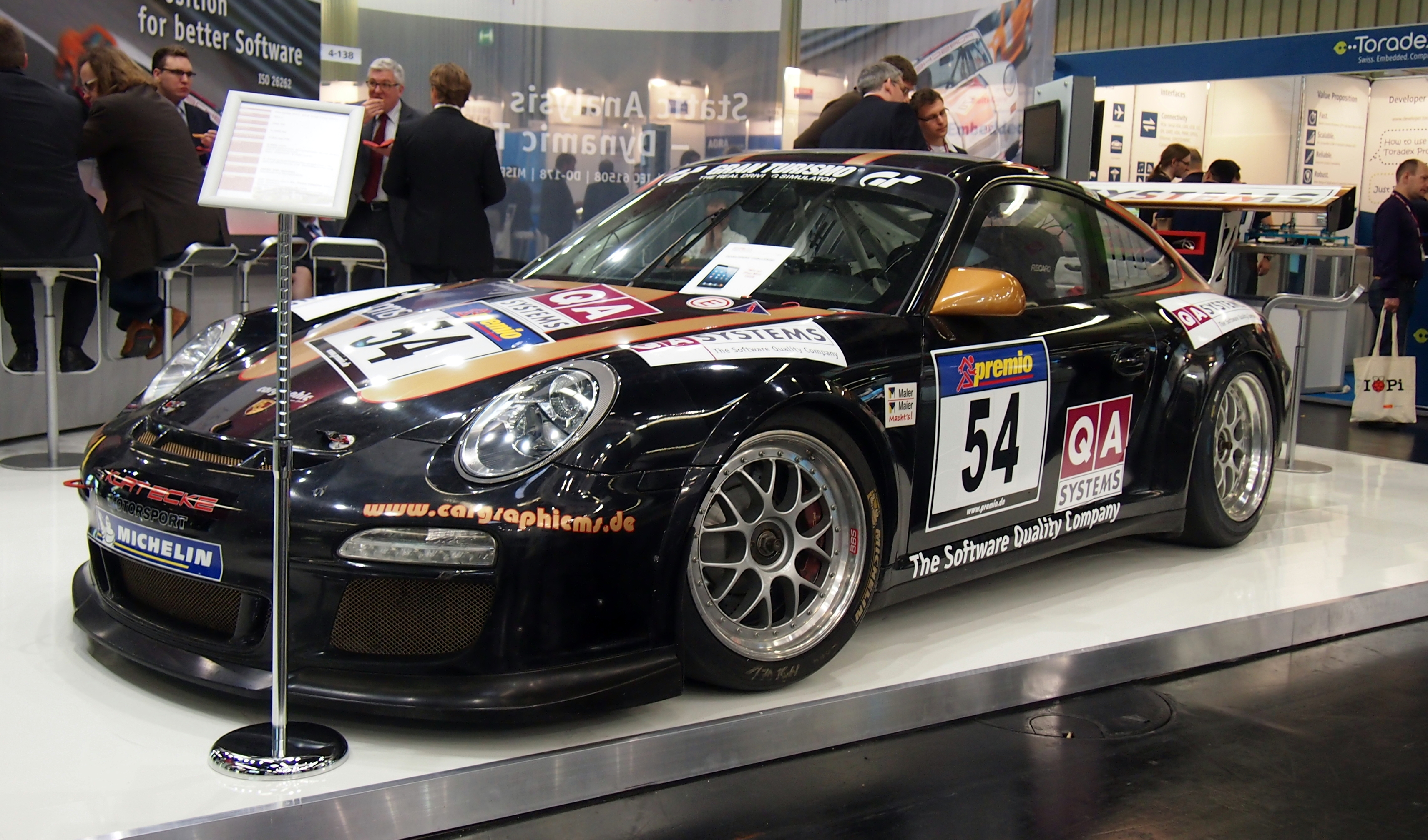 Embedded World 2014:Porsche 911 GT3 Cup, Typ 997 (1200kg, 450 PS) Einsatz: ADAC 24h-Rennen Nürburgring. Platzierungen: 2013: 31. Platz (Bestes Amateuerteam) 2012: Ausfall wg. Unfall 2011: 25. Platz